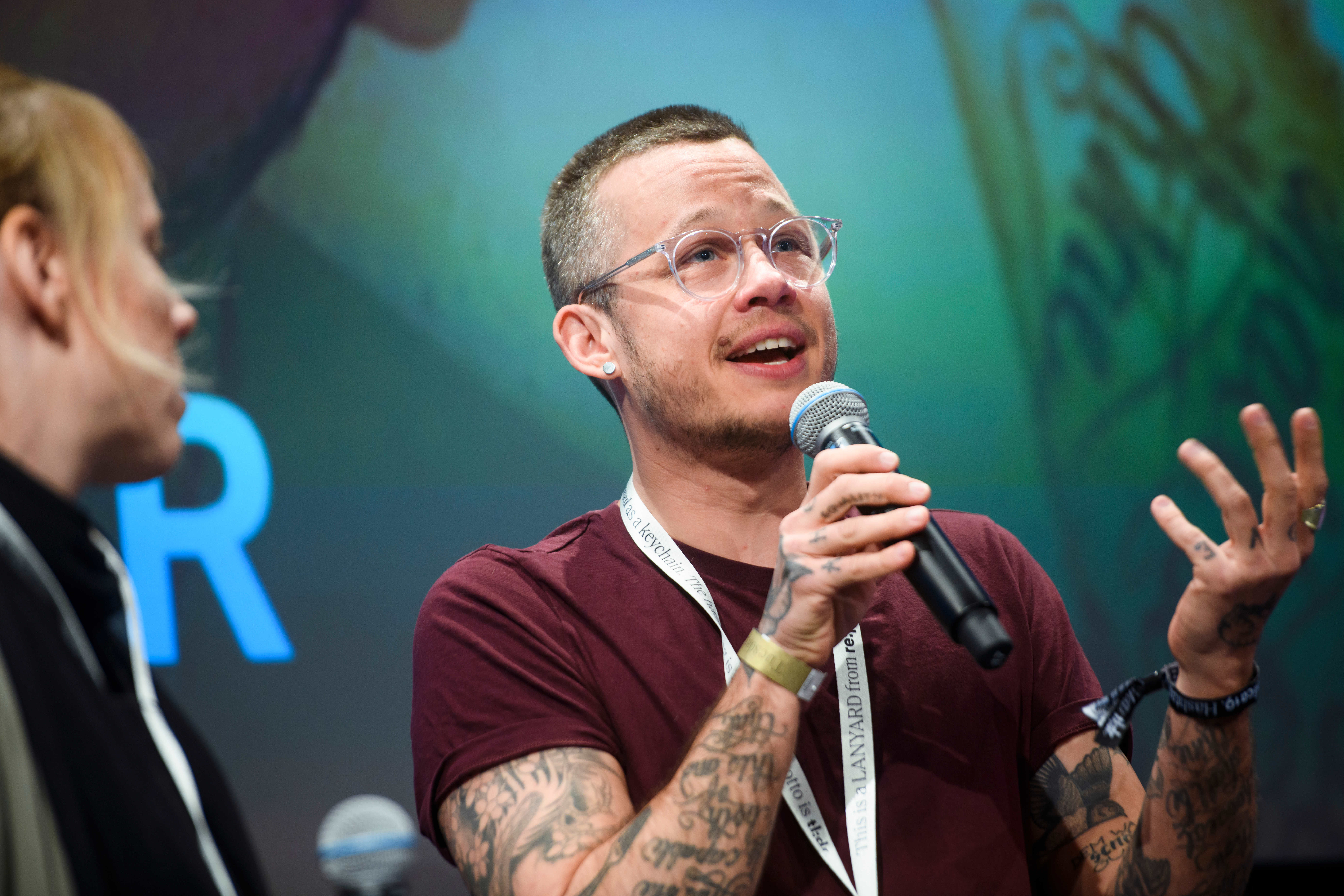 Session: Sprache mit Sternchen: Über Trans* reden Speaker: Henri Jakobs, Christina Wolf